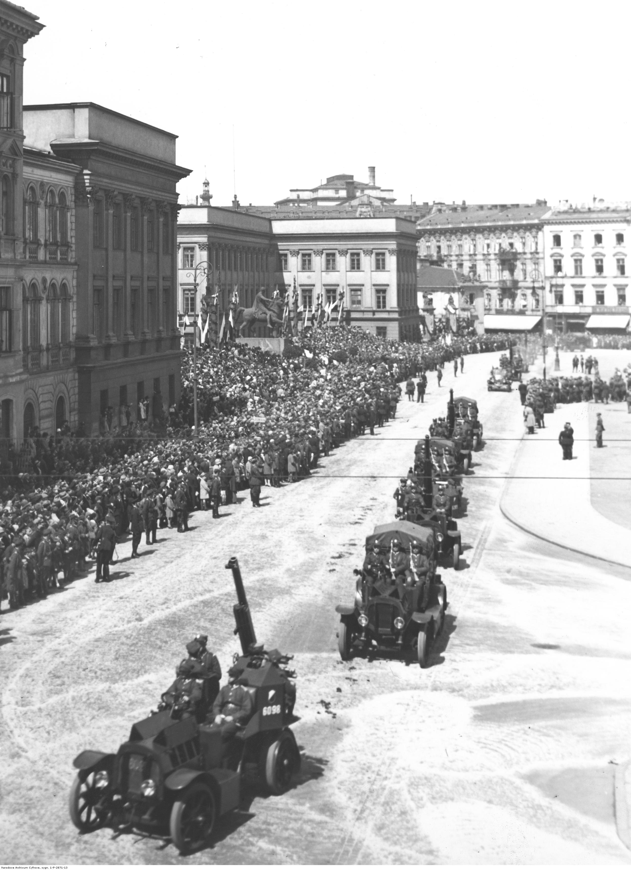 Uroczystości święta 3 Maja w Warszawie. 1. Pułk Artylerii Przeciwlotniczej wyposażony w samochody De Dion-Bouton przejeżdża przed Pałacem Saskim podczas rewii wojskowej na placu Piłsudskiego. Koncern Ilustrowany Kurier Codzienny - Archiwum Ilustracji. Sygnatura: 1-P-2871-13